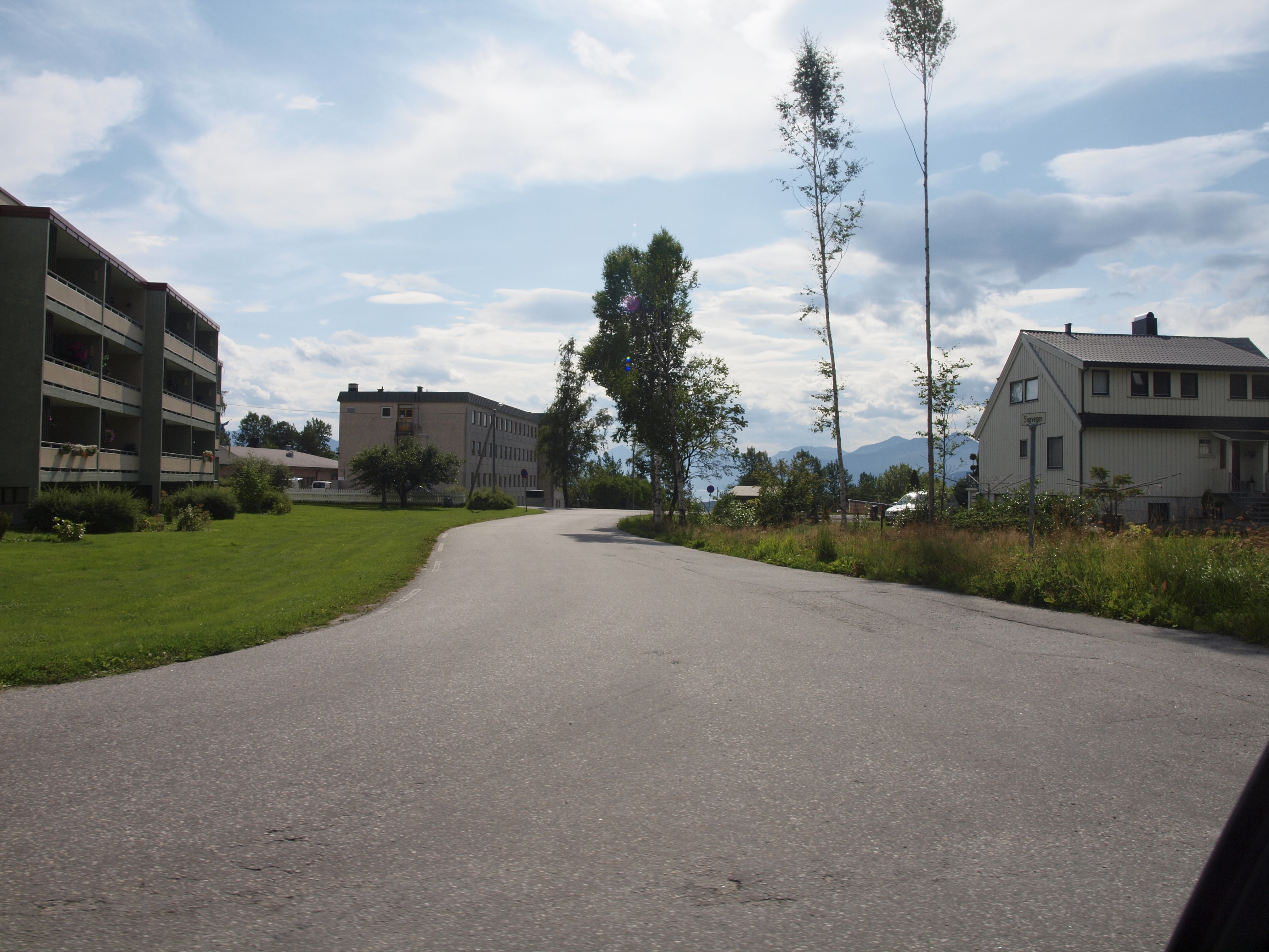 Cecilienfrydvegen in Molde